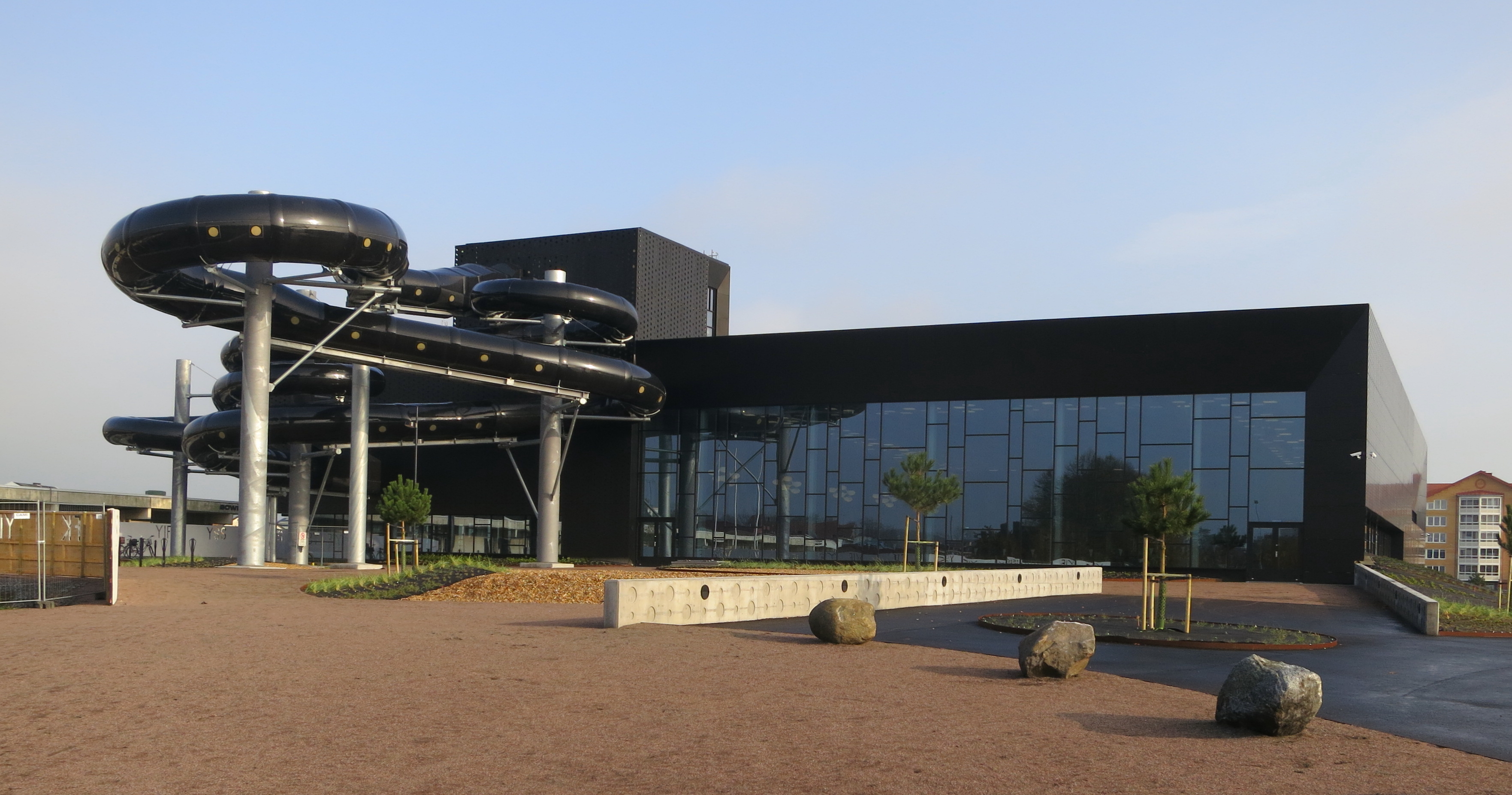 Ystad Arena, simhallen